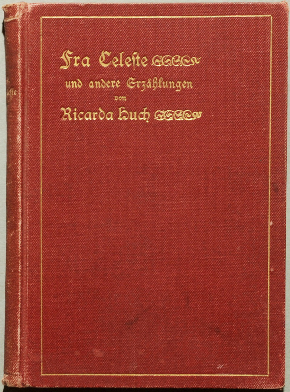 Huch, Ricarda: Frau Celeste und andere Erzählungen. Leipzig: H. Hessel 1899, 273 Seiten. Enthält die Erzählungen Fra Celeste, Der arme Heinrich, Der Weltuntergang, Die Maiwiese (Wilpert/Gühring² 11).